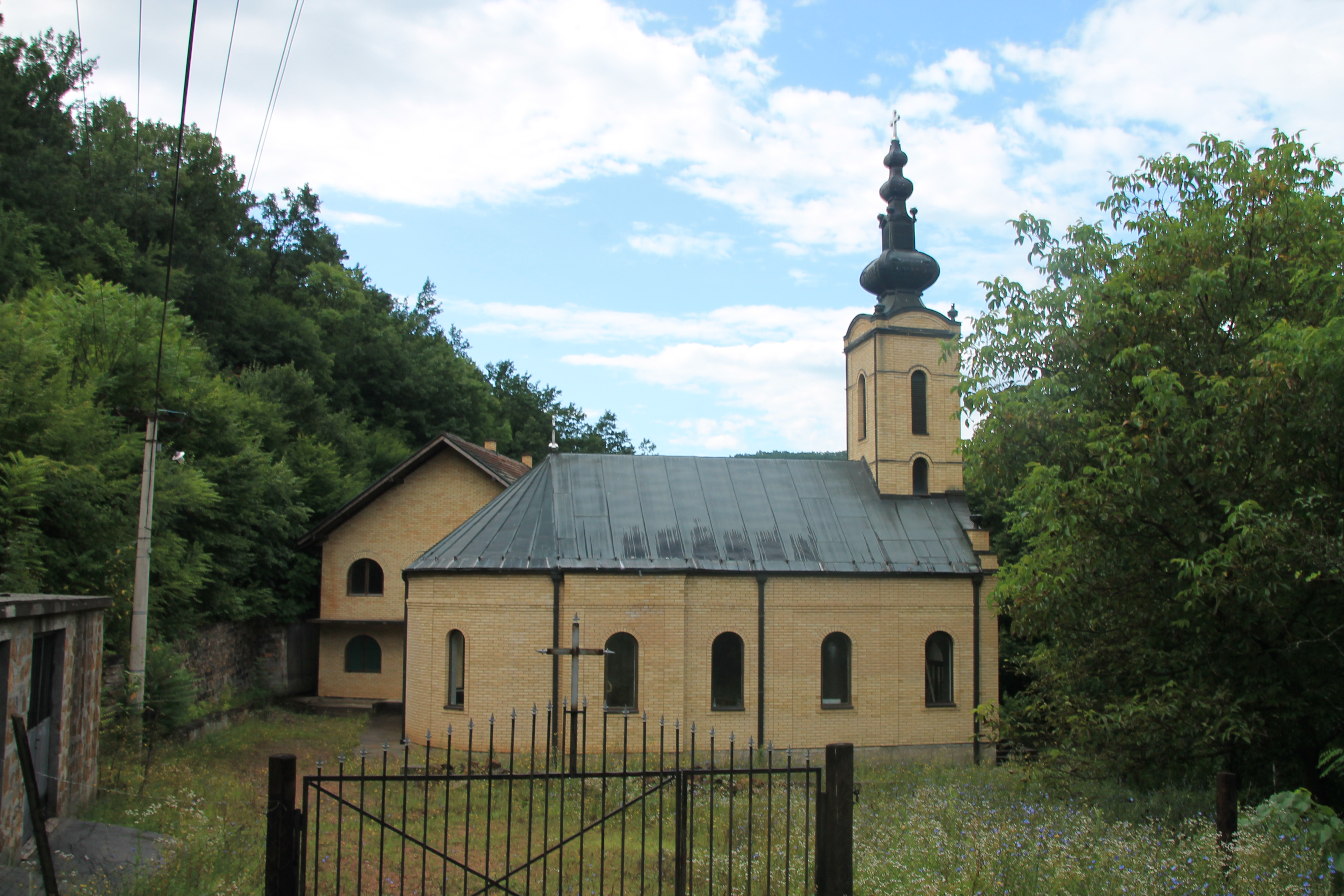 Manastir Prekopeča